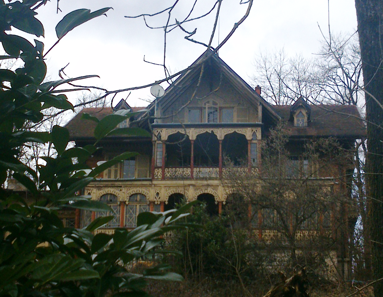 Chalet Meiner, Appenans, Doubs